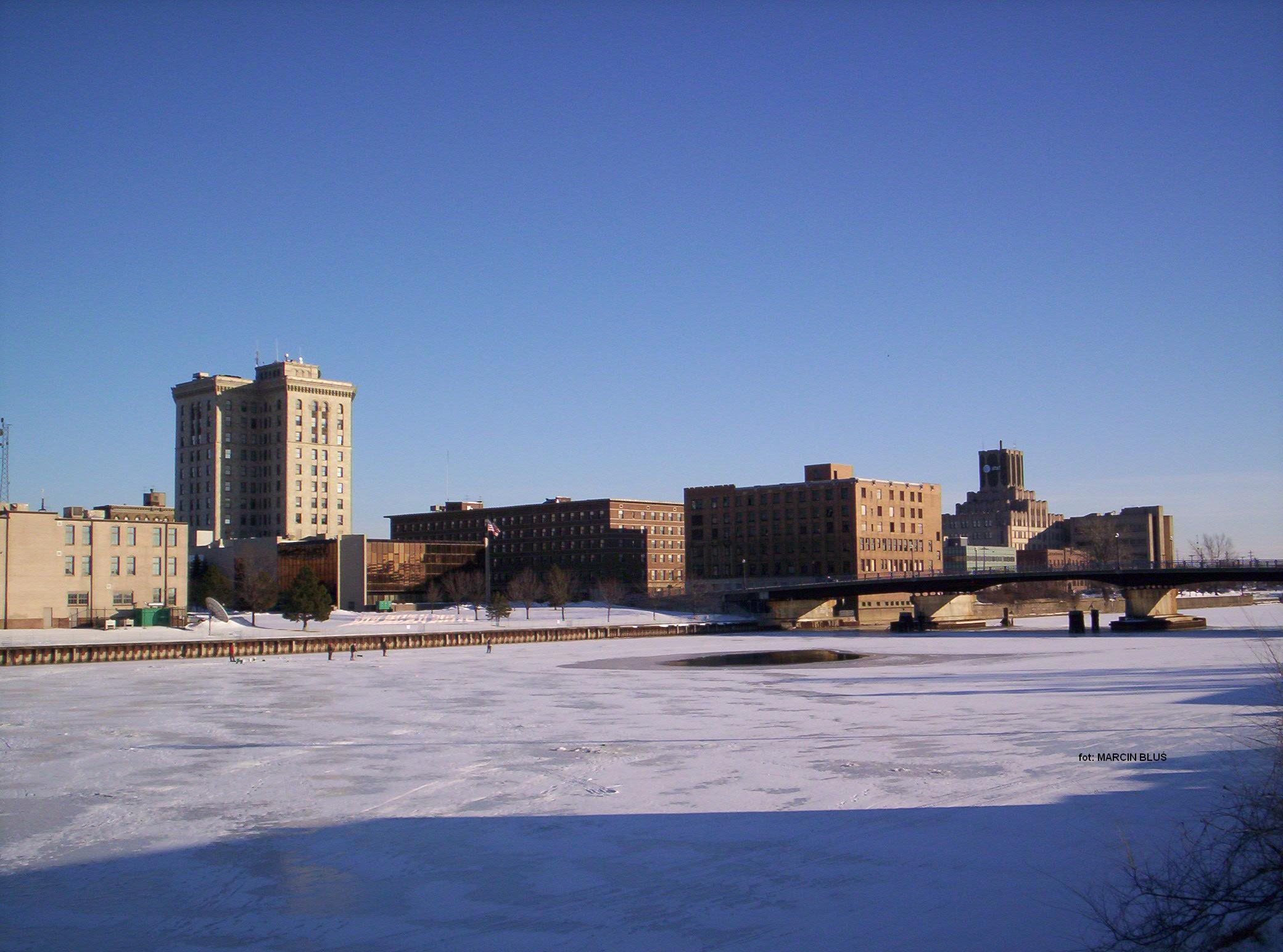 Saginaw, MI, USA 2008.02.22